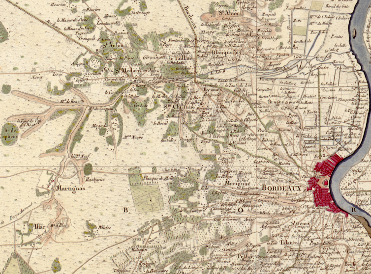 Carte de Cassini n°104 (Gironde, zoom sur la Jalle), 1756.